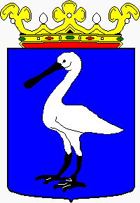 Gemeentewapen Wormerland